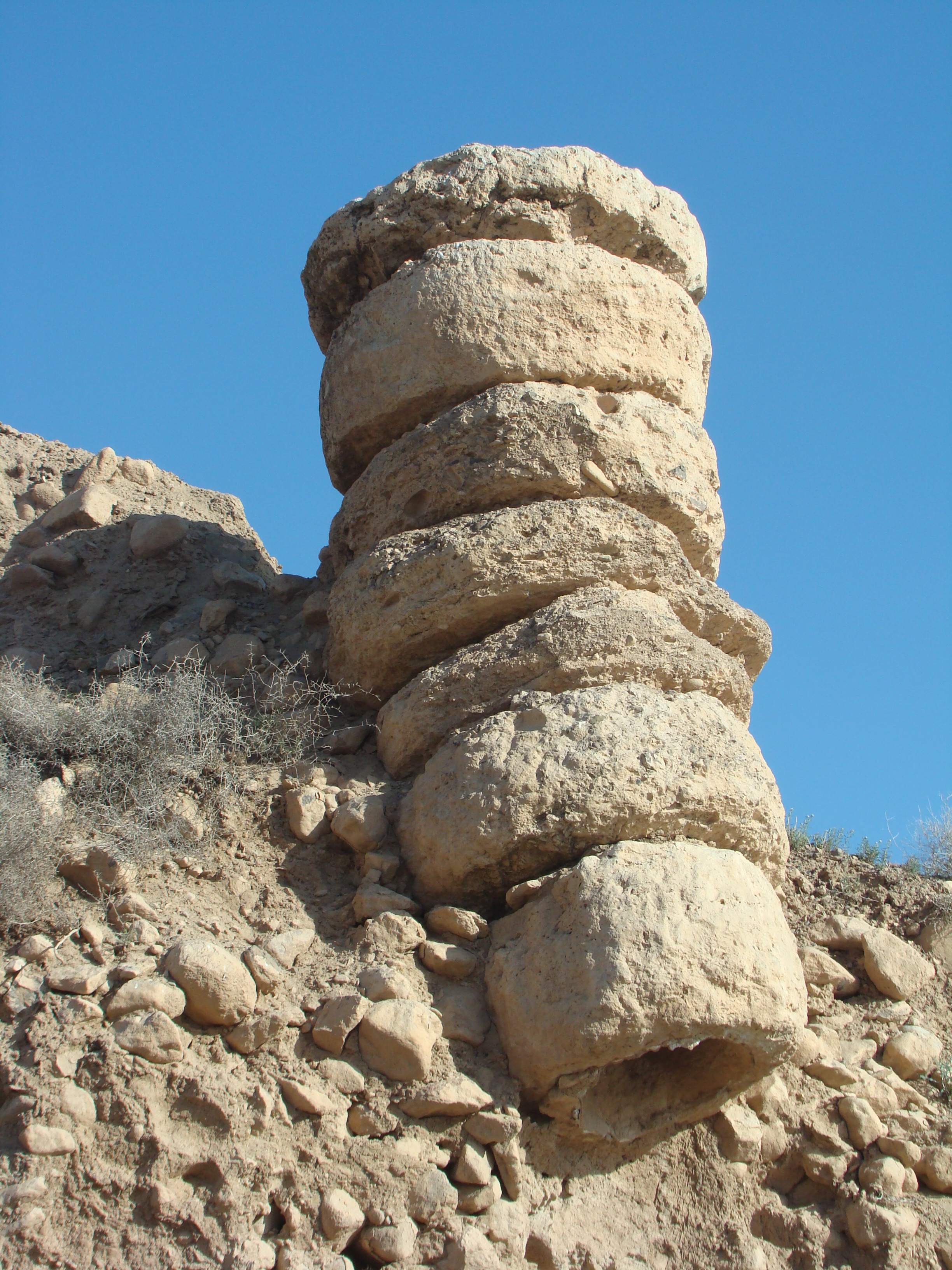 بقایایی از اسیاب آبی روستای بام